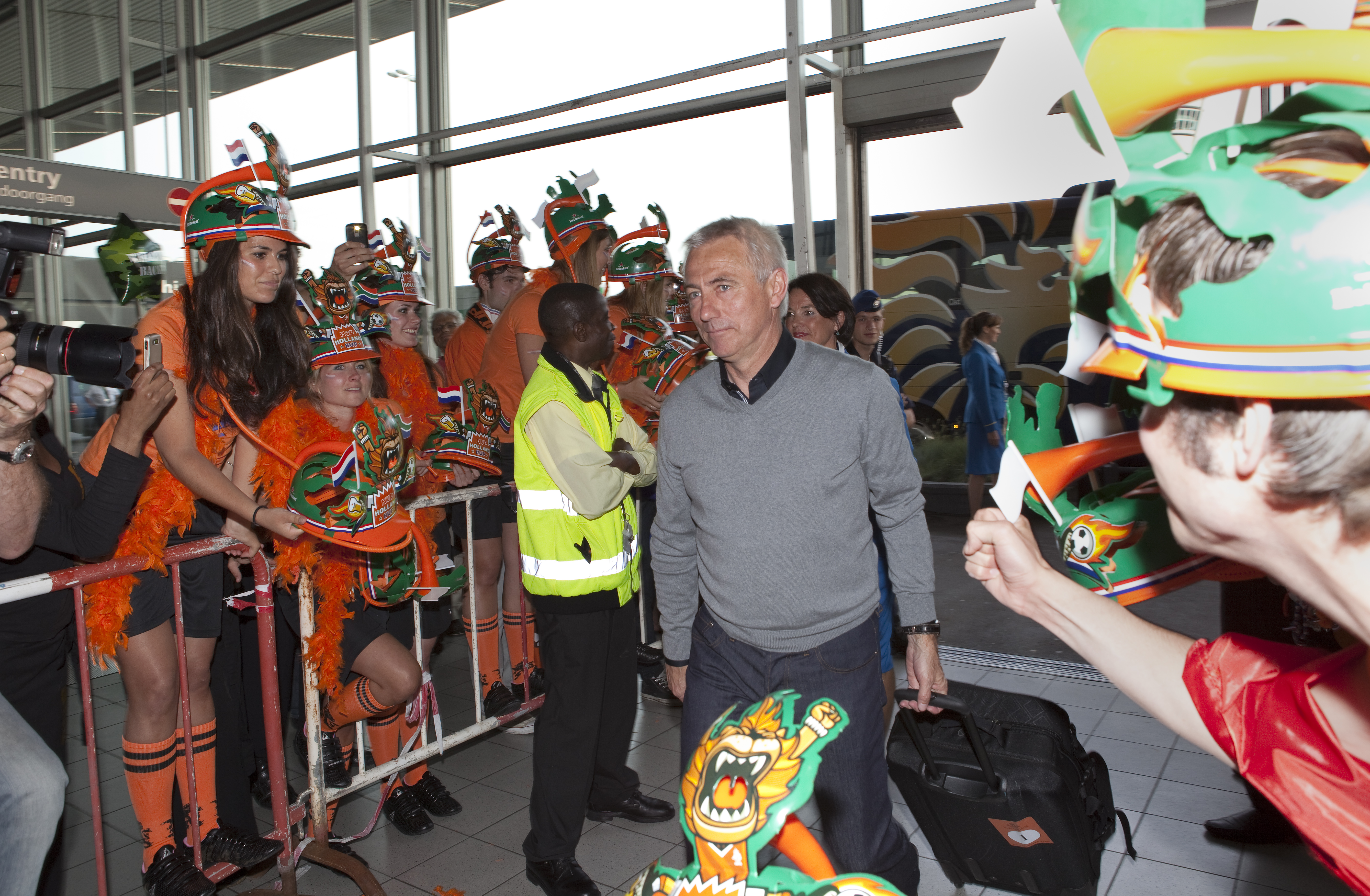 Oranje uitgezwaaid - Van Marwijk